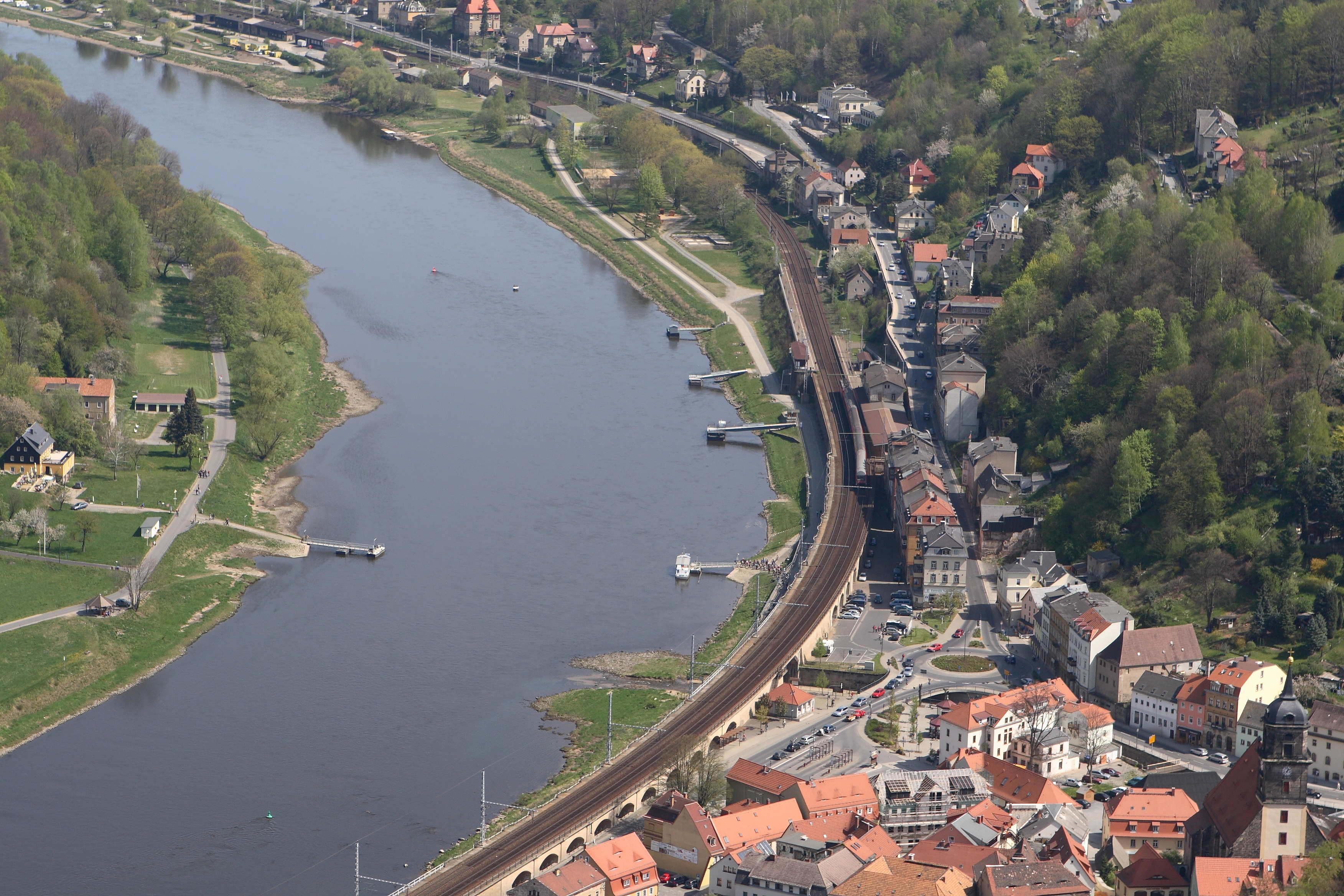 Koenigstein Saxony